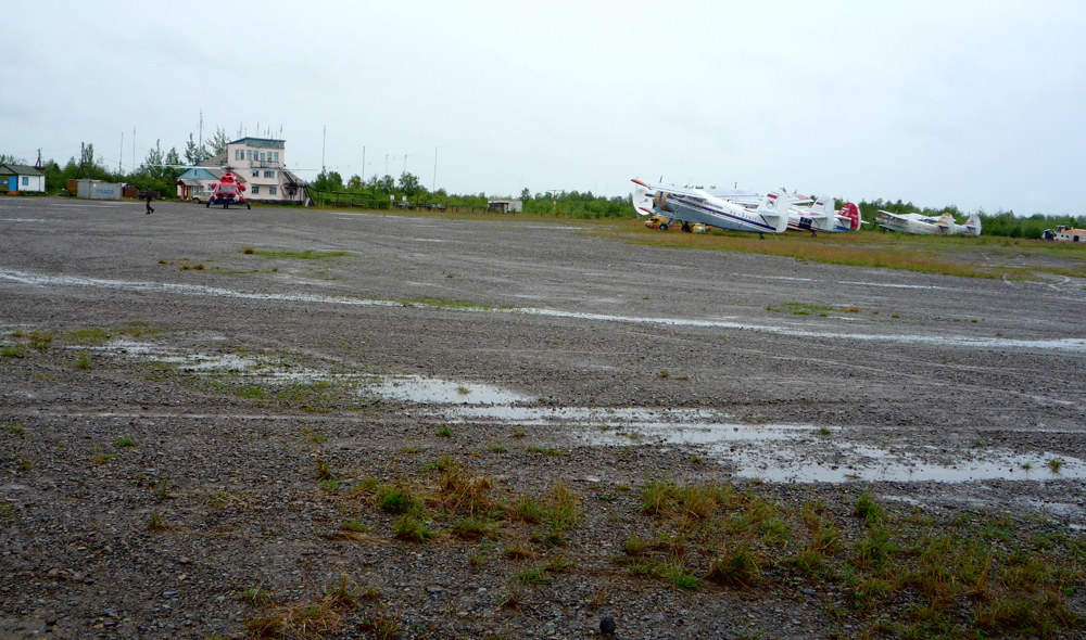 Аэропорт Марково